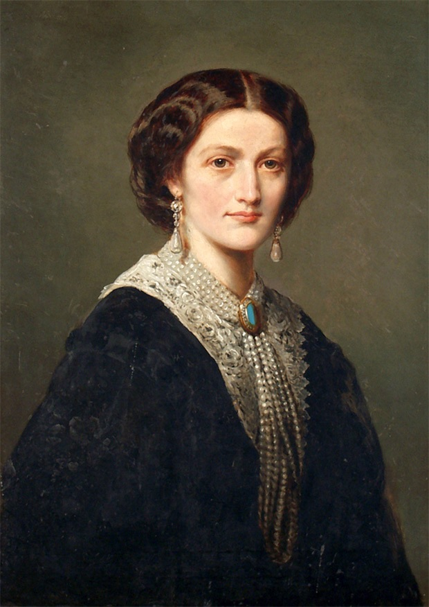 Hrabina Maria Klementyna z Sanguszków Potocka (kopia) (1830-1903)